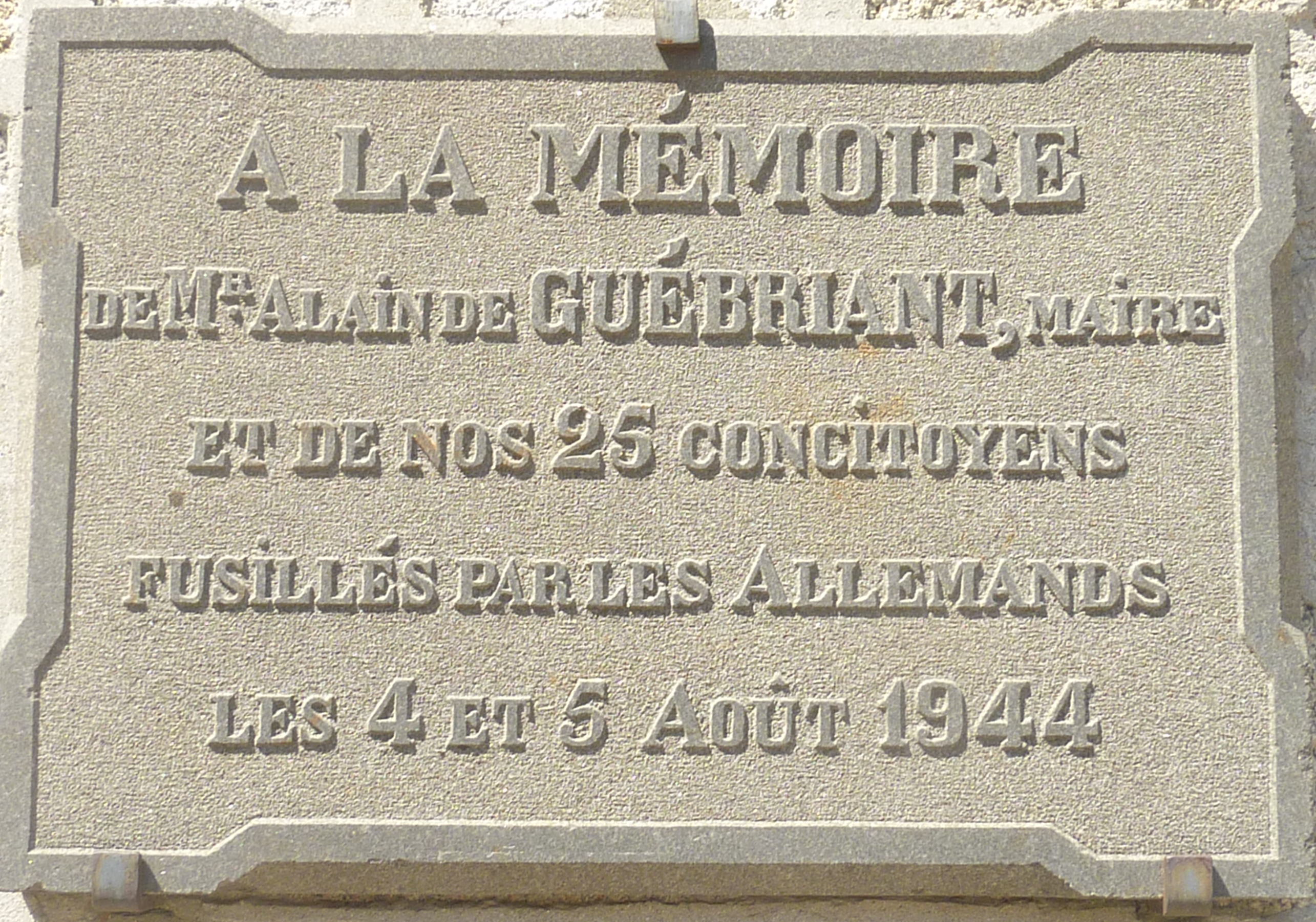 Saint-Pol-de-Léon : plaque commémorative en mémoire d'Alain de Guébriant, maire, et de 25 autres saint-politains, assassinés par les Allemands les 4 et 5 août 1944.